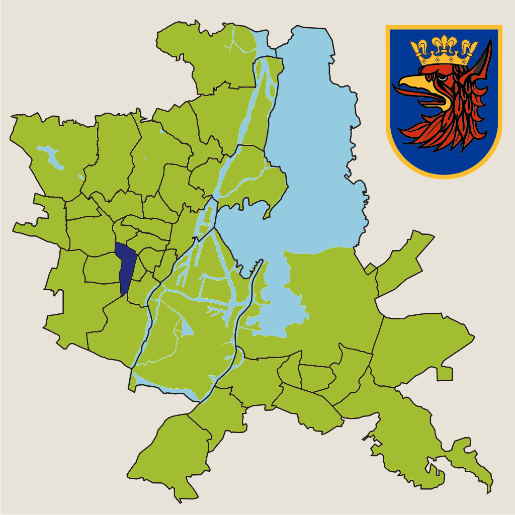 Osiedle "Turzyn" w Szczecinie – jednostka pomocnicza miasta w 2010